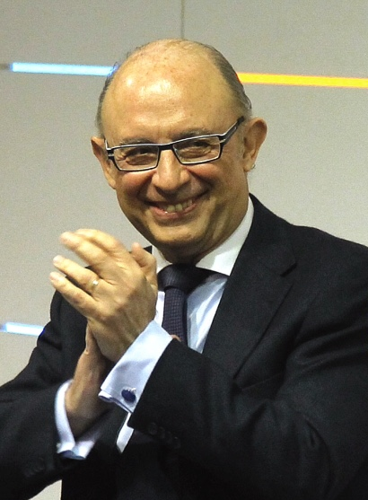 Fabra y Montoro explican la reforma fiscal